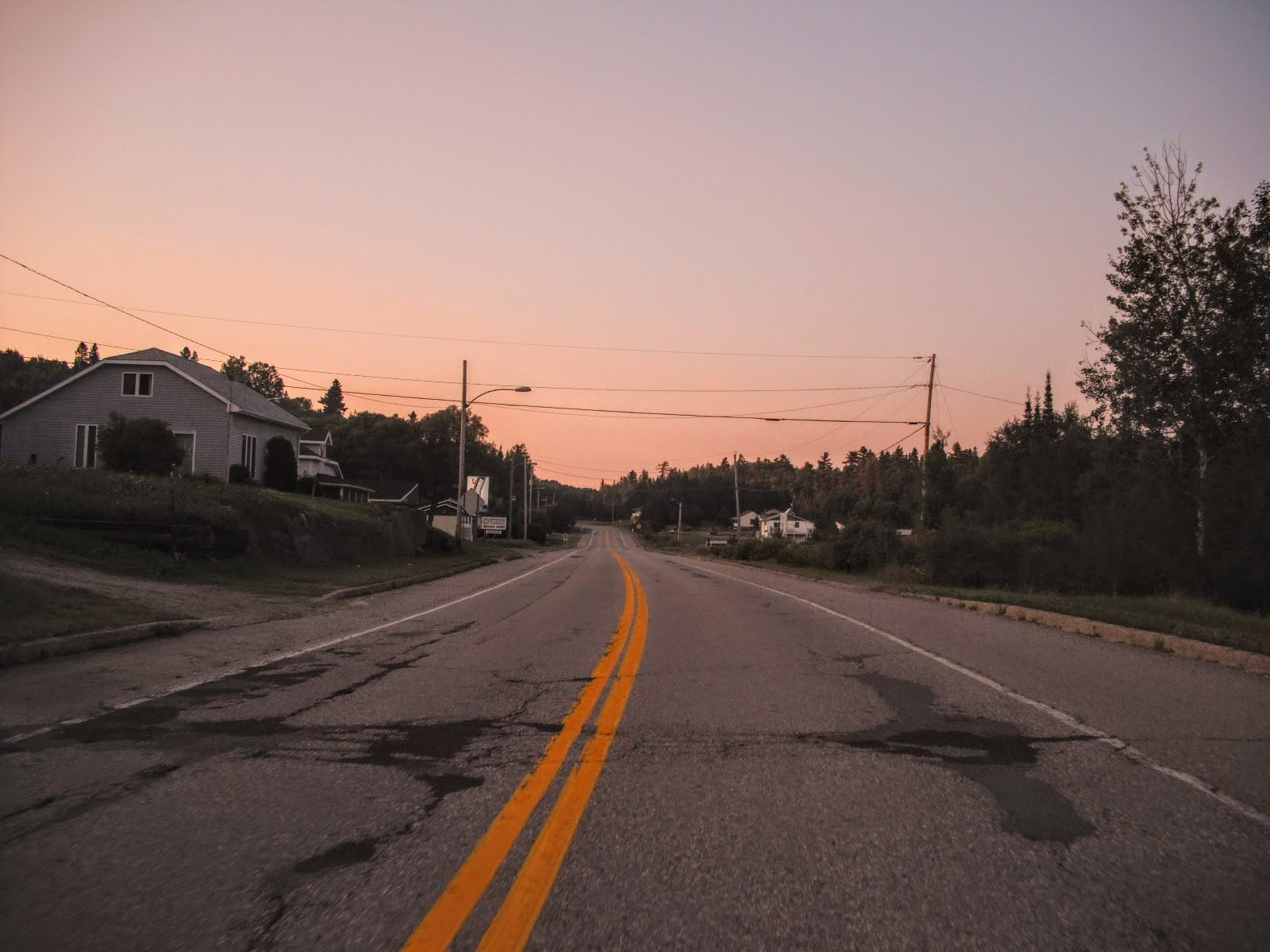 Vue du hameau de Laniel, au Témiscamingue, à partir de la route 101 direction nord.